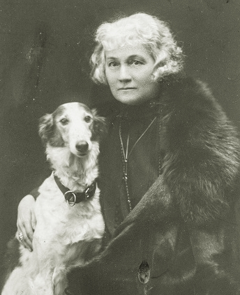 Maria Teresa Sułkowska Moser von Ebreichsdorf - Za zgodą i ze zbiorów rodziny książąt Sułkowskich w Wiedniu / With permission and from the collection of the prince Sułkowski family from Wien.